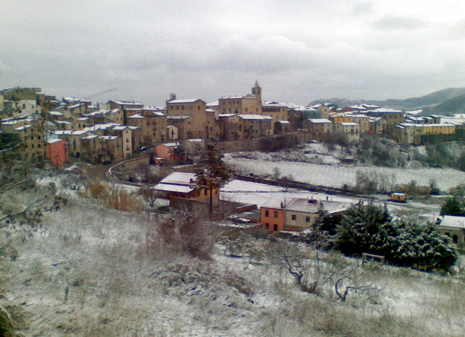 Casacalenda sotto la neve